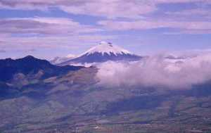 Volcano Cotopaxi, Ecuador